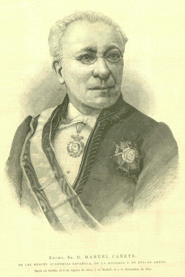 Excmo. Sr. D. Manuel Cañete, de las Reales Academias Española, de la Historia y de Bellas Artes nació en Sevilla el 6 de agosto 1822, falleció en Madrid el 4 de noviembre de 1891.